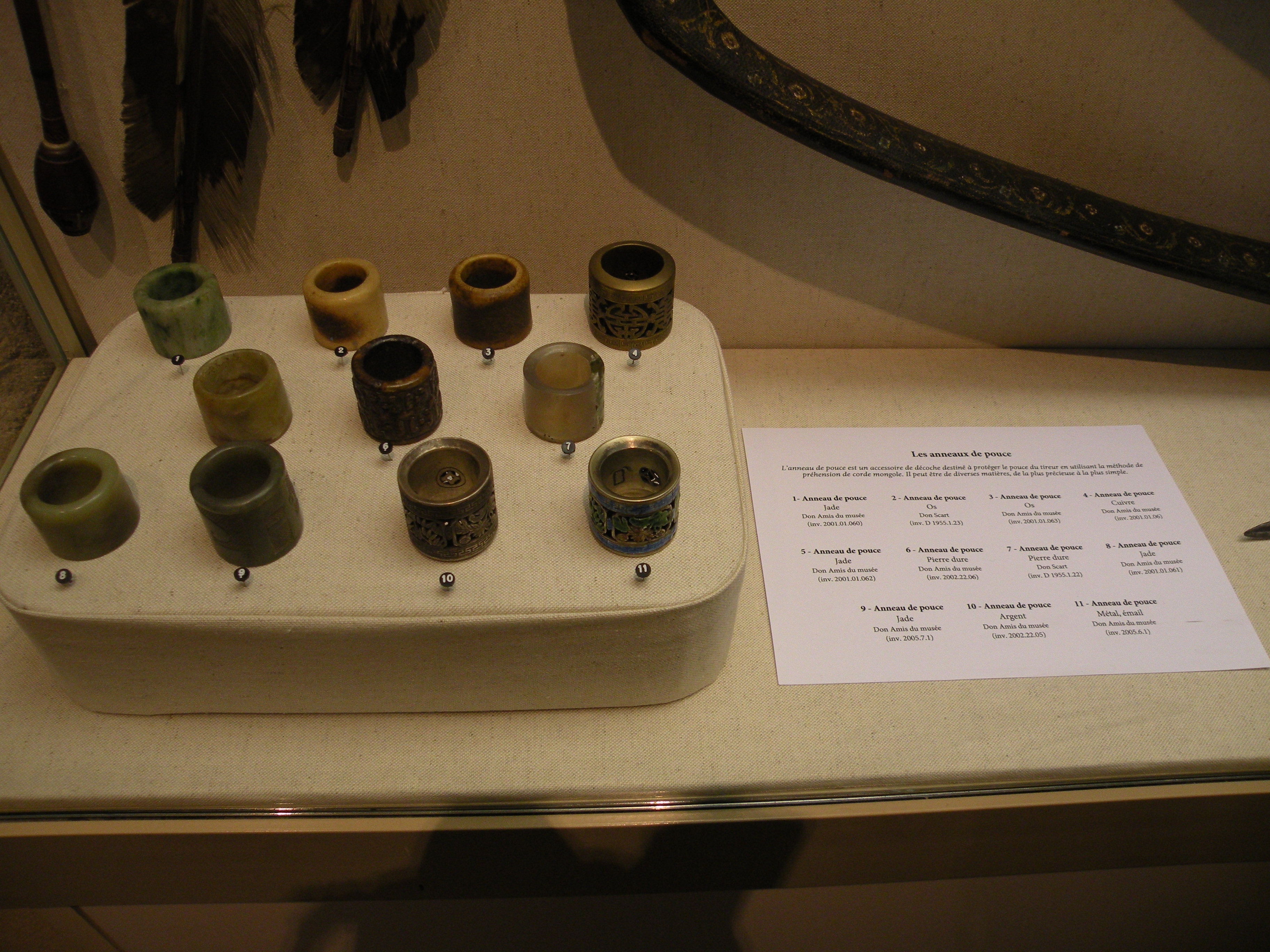 anneau de pouce salle II du musée de l'archerie